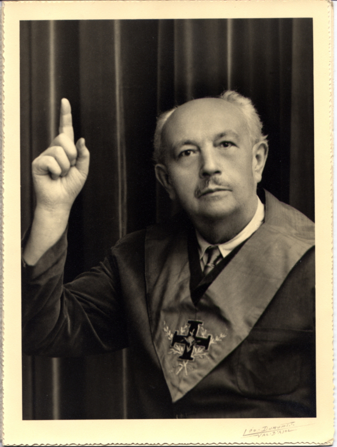 Chevalier Rose-Croix de la Loge Agni""